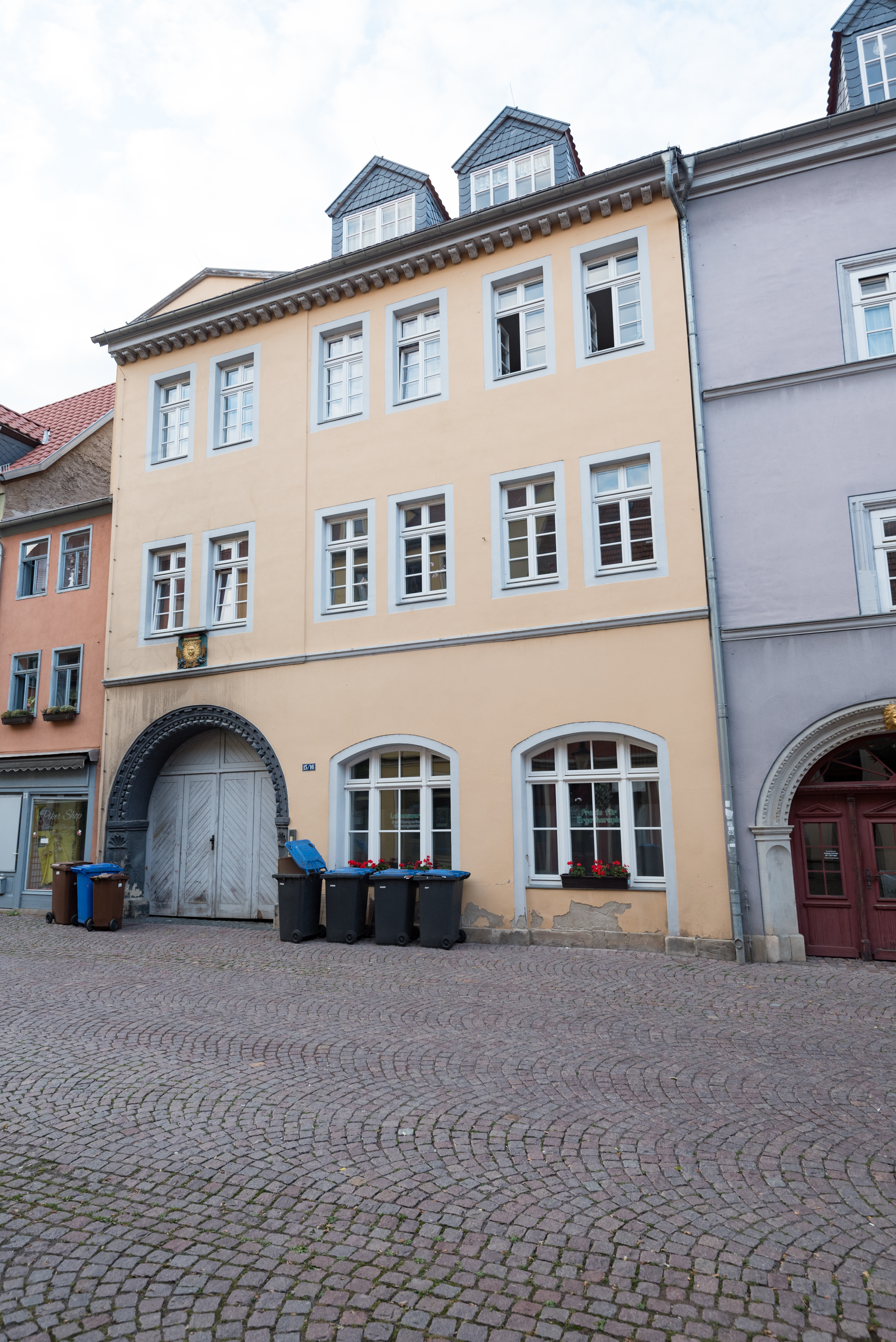 Naumburg (Saale), Salzstraße 16